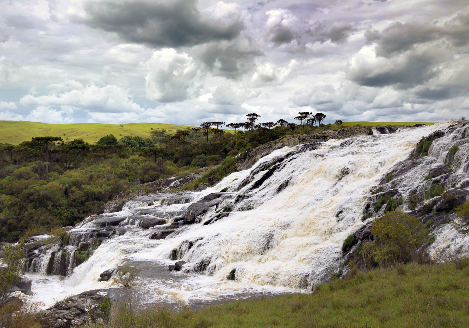 Localizada a 38 km de Cambará do Sul, no município de Jaquirana onde o rio Tainhas forma um lajeado de 80 metros de largura que despenca em uma bela cachoeira é ótimo local para banho e camping (sem estrutura). Quando o rio está em seu nível normal, é possível travessa-lo de automóvel, a cavalo ou até mesmo a pé, necessitando, porém, muita cautela para atravessar. Neste passeio é possível conhecer uma belíssima paisagem por onde os tropeiros cruzavam o Rio Tainhas, neste local o rio deixa de ser profundo e corre sobre um lajeado que é possível cruzar o rio. A natureza foi caprichosa e este lajeado curiosamente tem o formato de um perfeito S, originando daí o nome do atrativo.